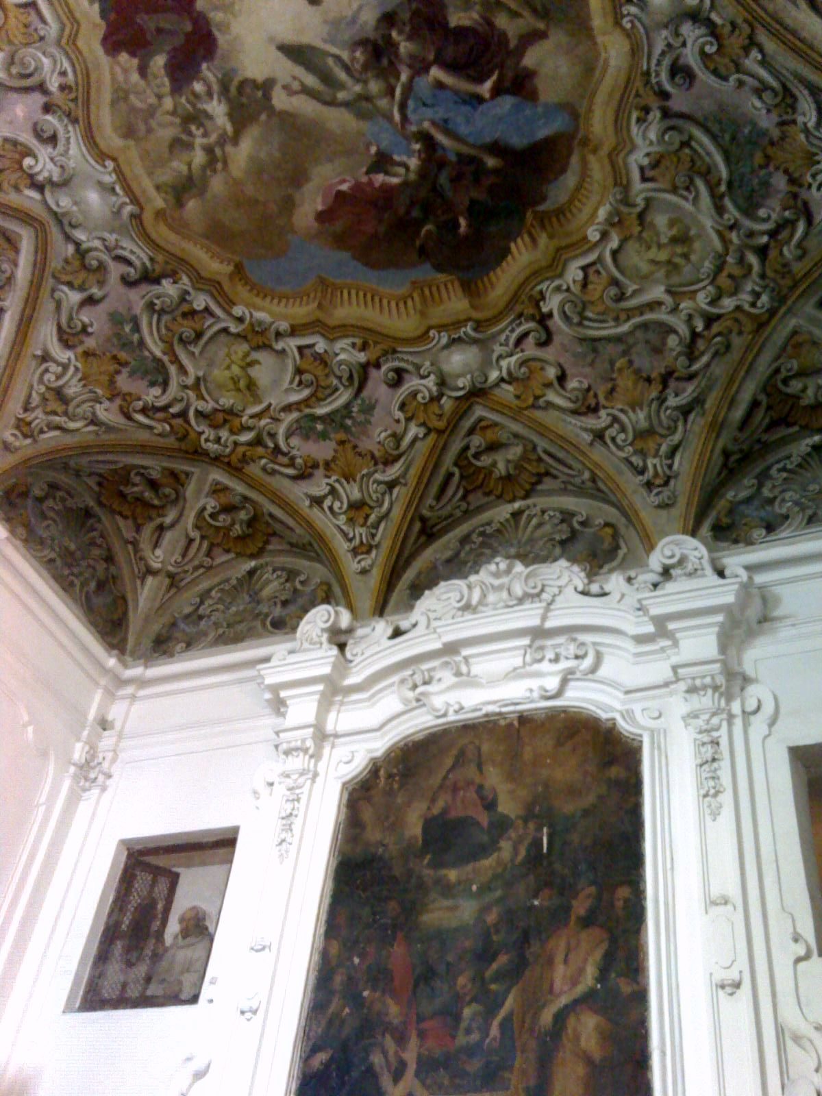 Chiesa di Sant'Anna dei Lombardi (Napoli) - Affresco, pala d'altare del Santafede ed affresco del Vasari accanto presenti nella sala che precede la sacrestia del Vasari